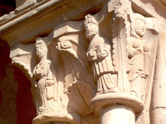 Capital on the St. Peter's Cloister